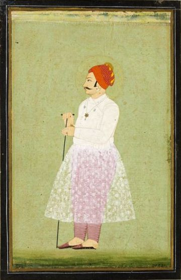 Raja Bishan Singh